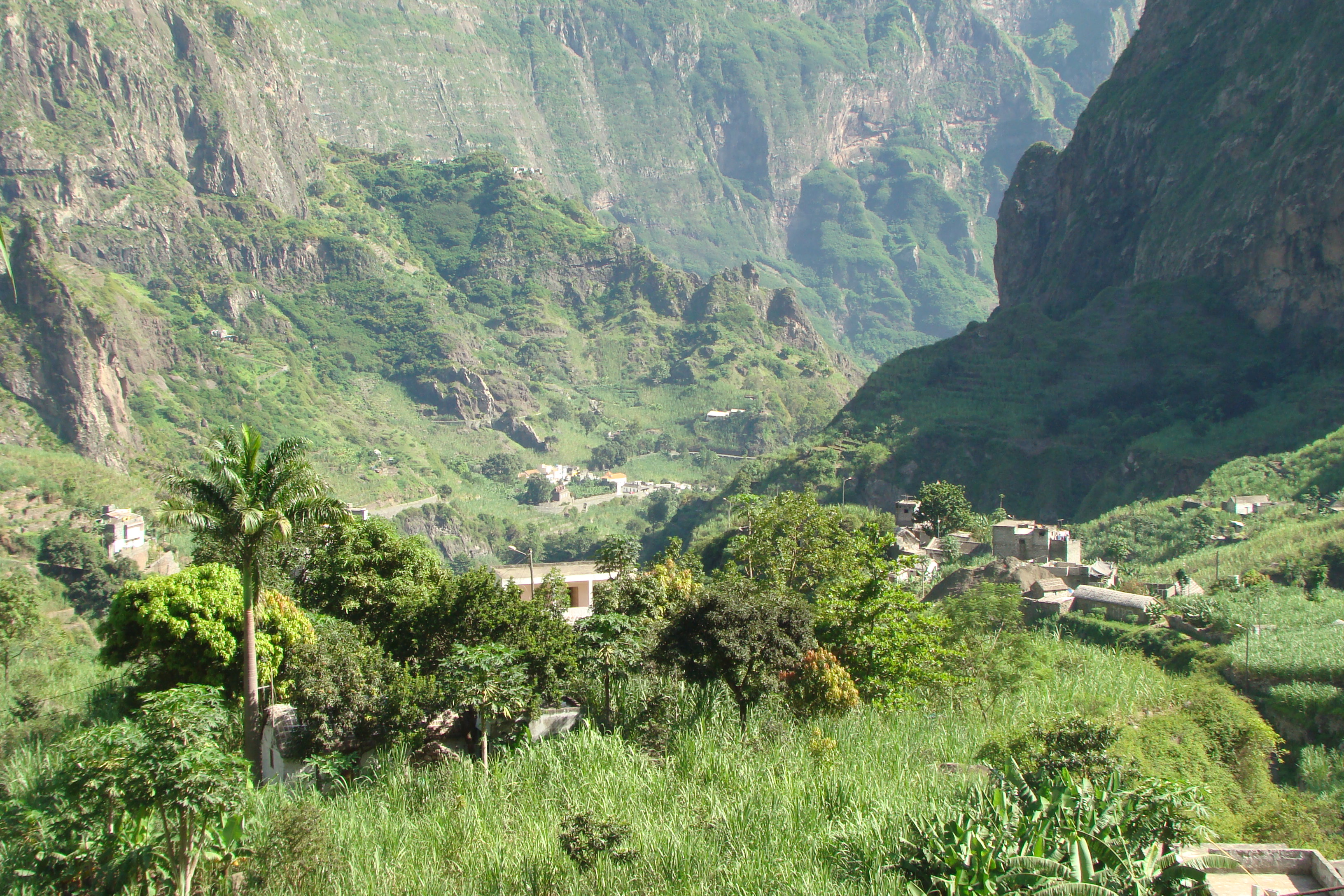 vista del tramo medio del Valle de Paul